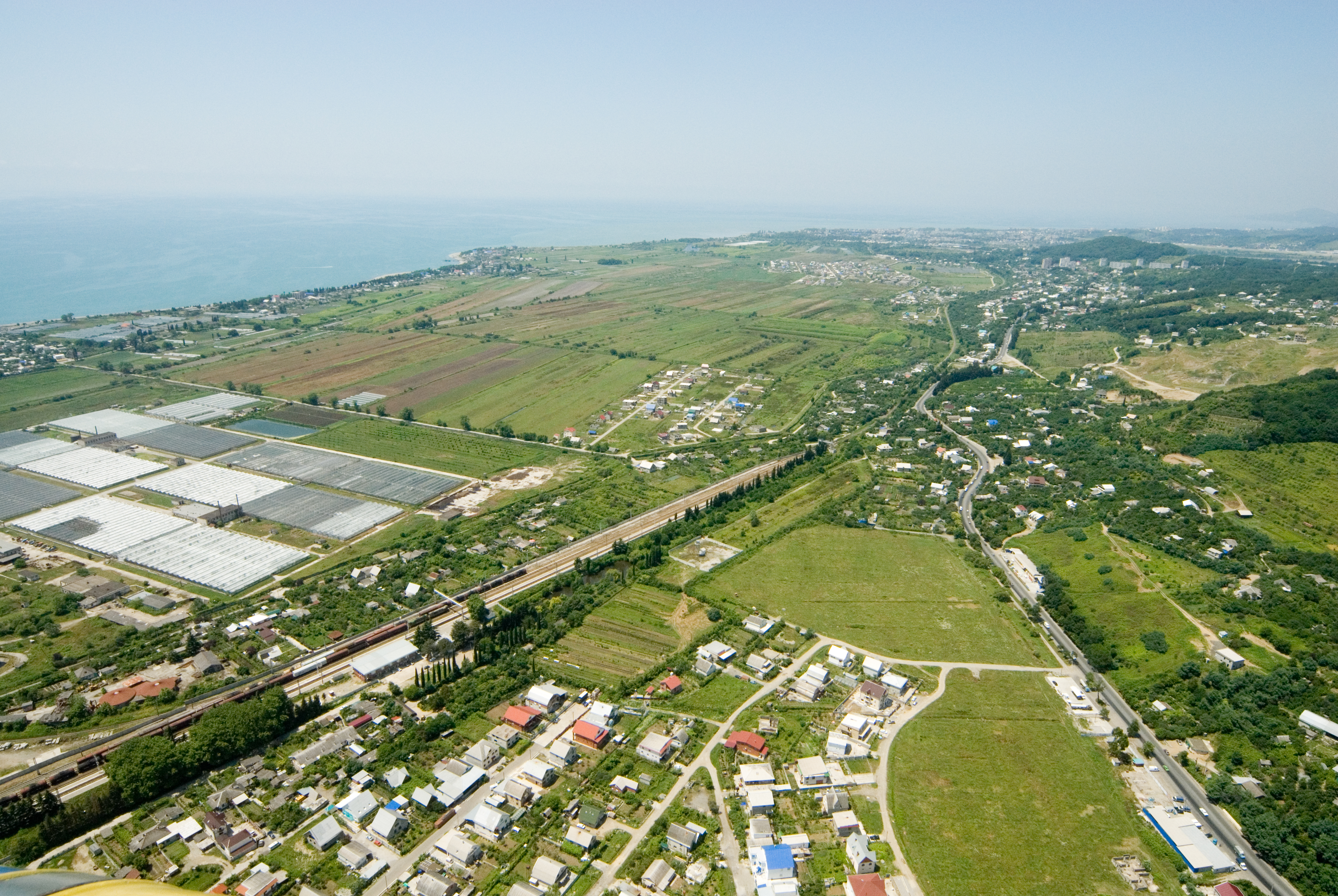 Имеретинская низменность а Адлерском районе города Сочи. Снимок сделан в 2006 году задолго до начала строительства Олимпийского парка